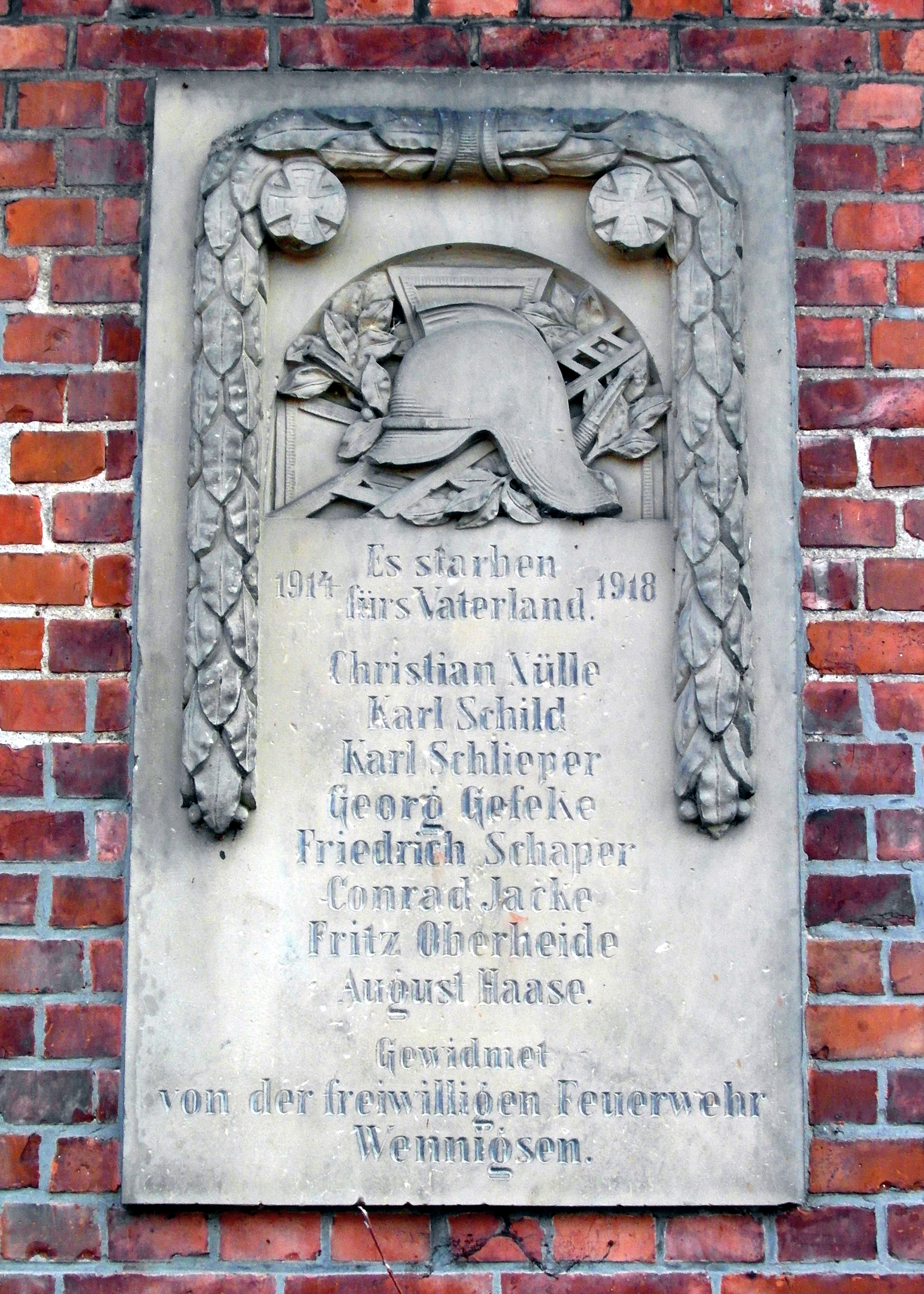 Gedenktafel für Gefallene des 1.Weltkriegs an der Seitenwand des Spritzenhaus Wennigsen